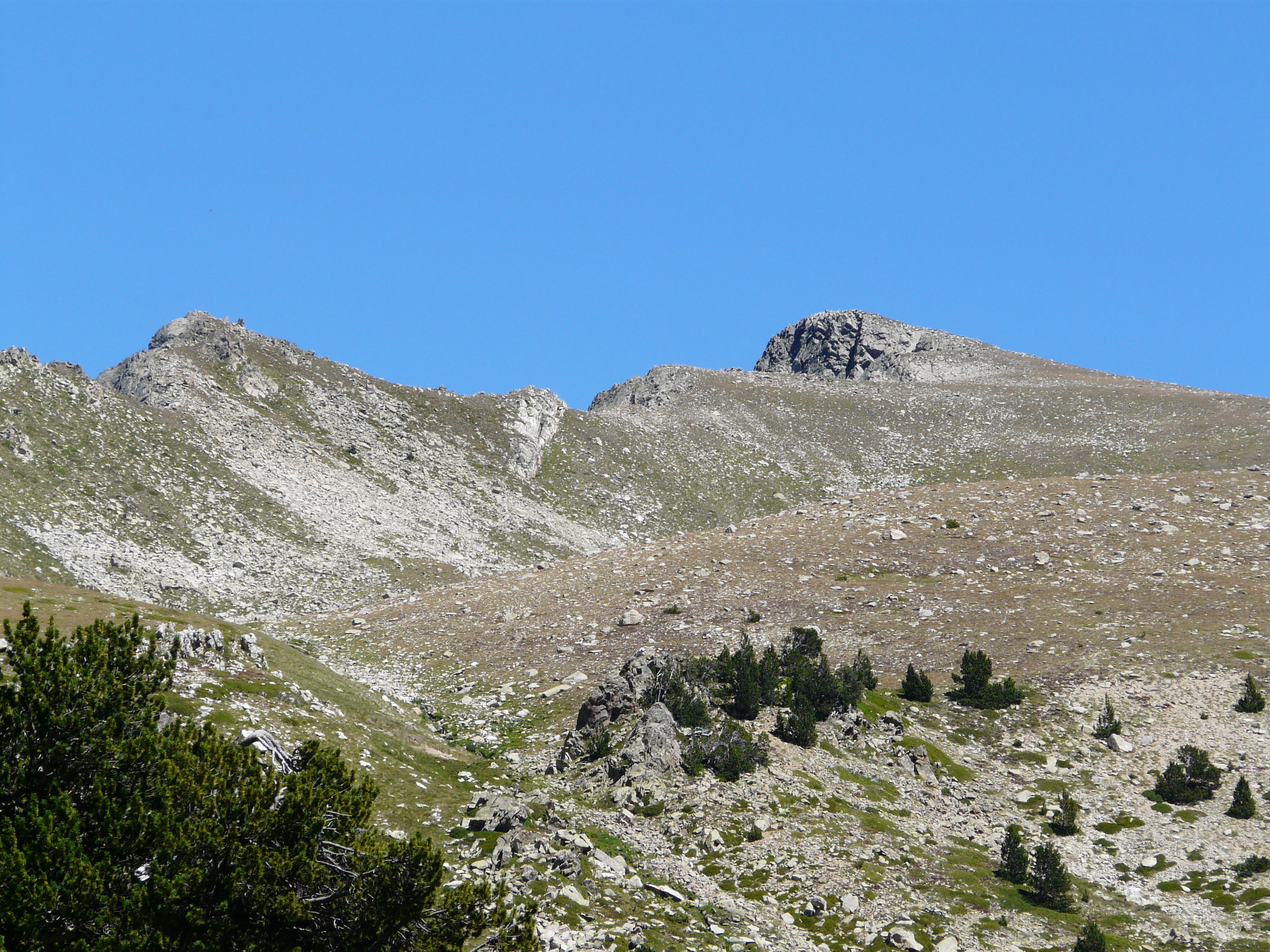 Tossa Plana de Lles-Puigpedrós (Cerdanya, Alt Urgell) (Lles de Cerdanya, les Valls de Valira, Meranges i altres). This is a a photo of a natural area in Catalonia, Spain, with id: ES510205 Object location42° 27′ 00″ N, 1° 42′ 00″ E